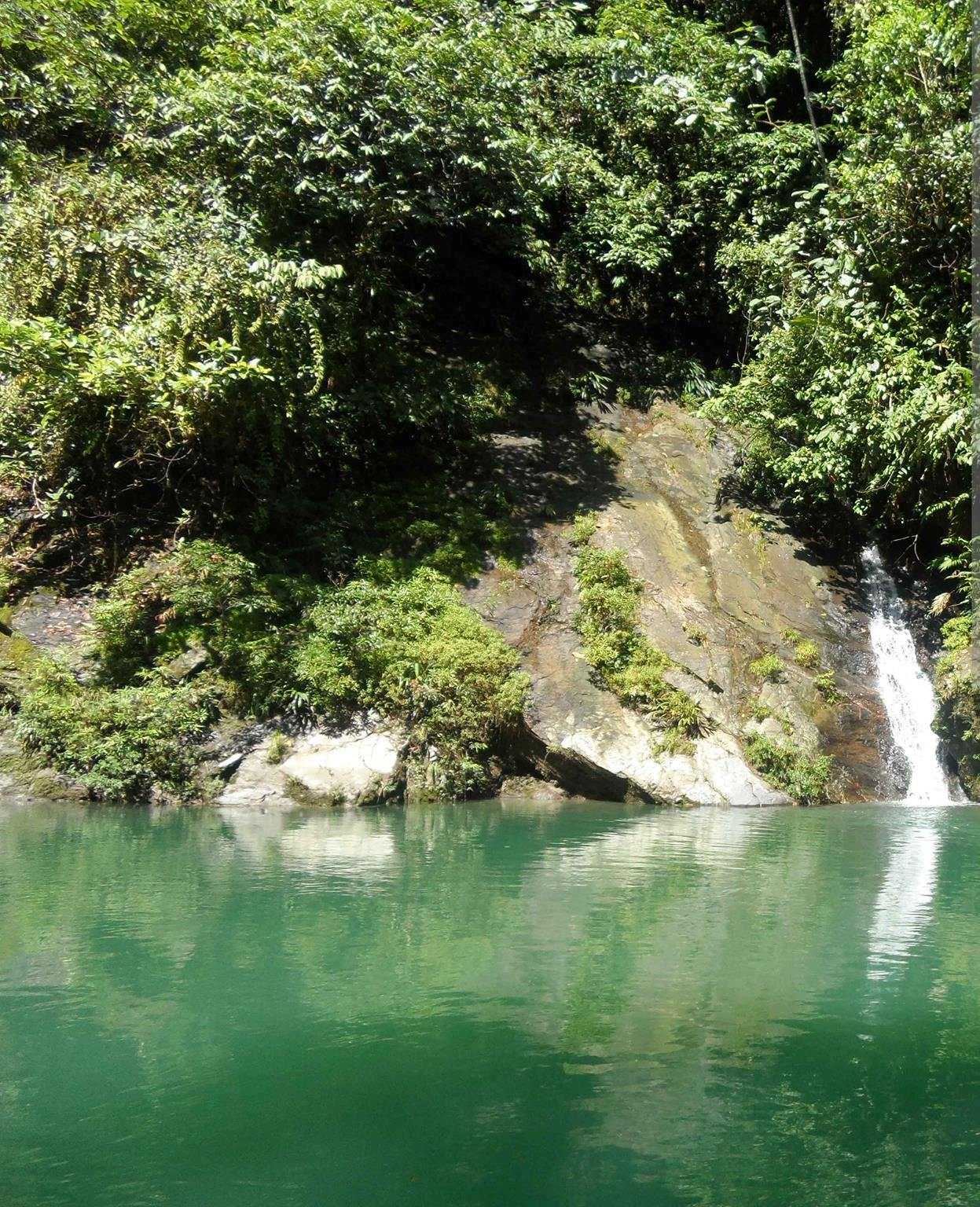 el hermoso rio naya